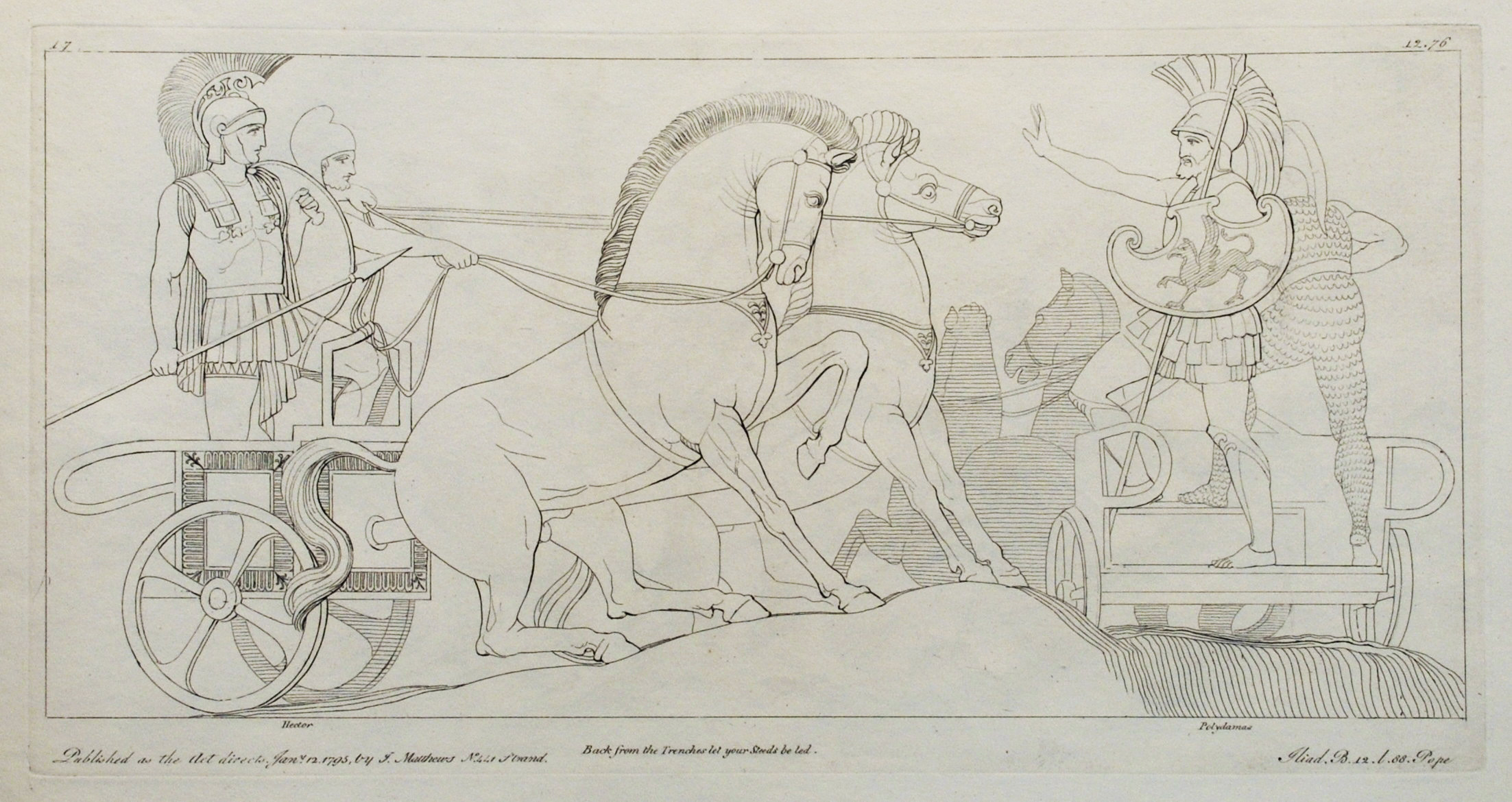 Kupferstich (1795) von Tommaso Piroli (1752 – 1824) nach einer Zeichnung (1793) von John Flaxman (1755 – 1826).